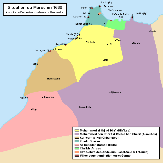 Situation du Maroc en 1660, à la suite de l'assassinat du dernier sultan saadien Ahmed al-Abbas (fin 1559) et l'usurpation du trône à Marrakech par Kerroum al-Haj. Carte selon Henry de Castries - Travail personnel